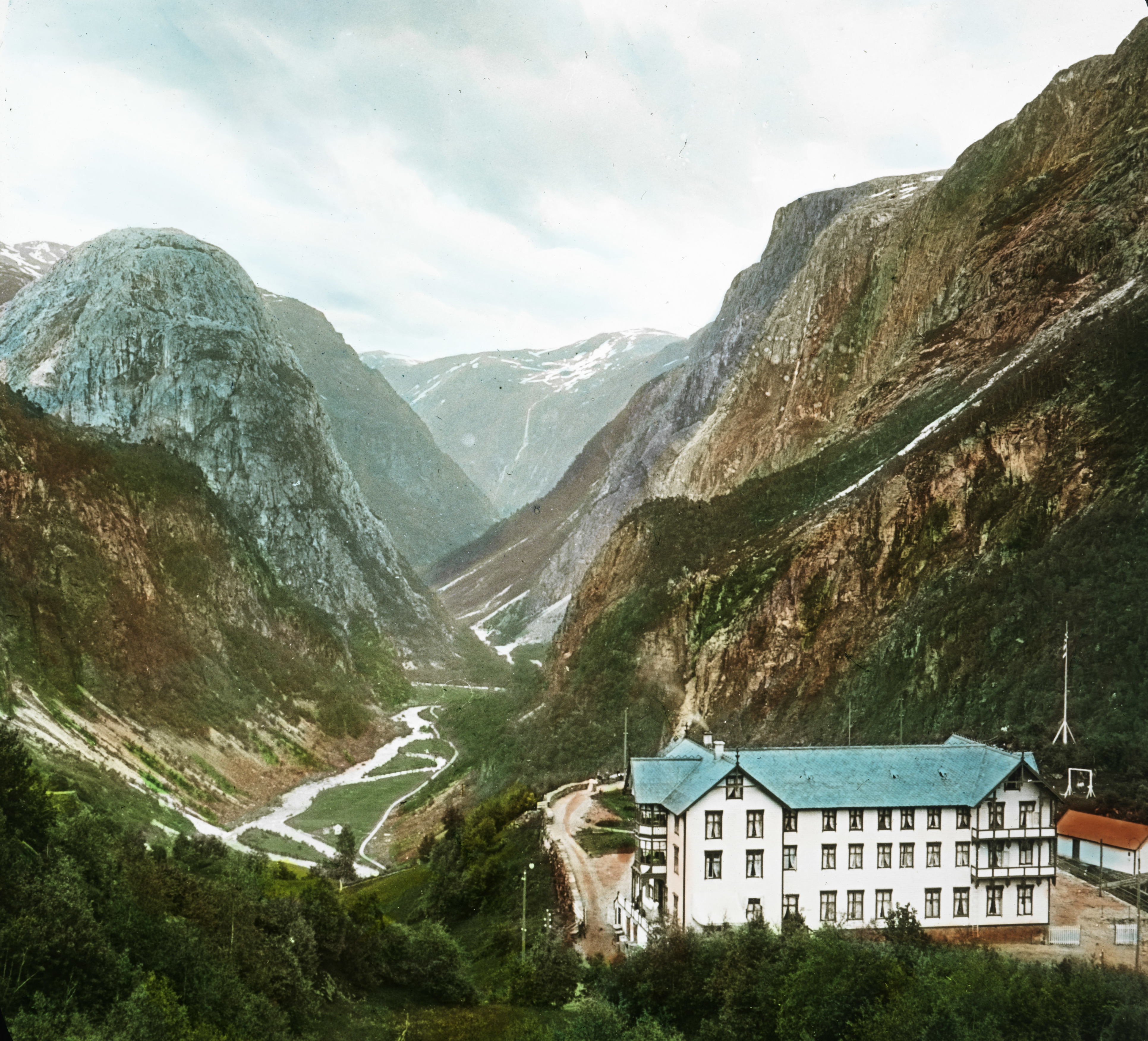 SFFf-1992078.0051 Stalheim Hotel near Voss, overlooking the Nærøydalen valley in Sogn og Fjordane.